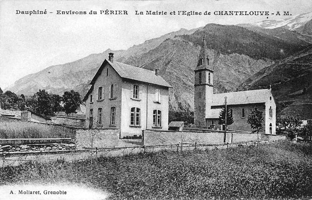 La mairie et l'église de Chantelouve, Isère, France.